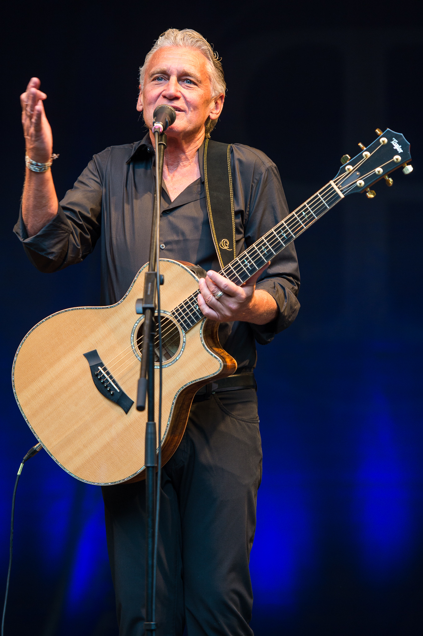 Concertbüro Franken,Konzert,Livekonzert,Livemusik,Musik,Rainhard Fendrich,Serenadenhof